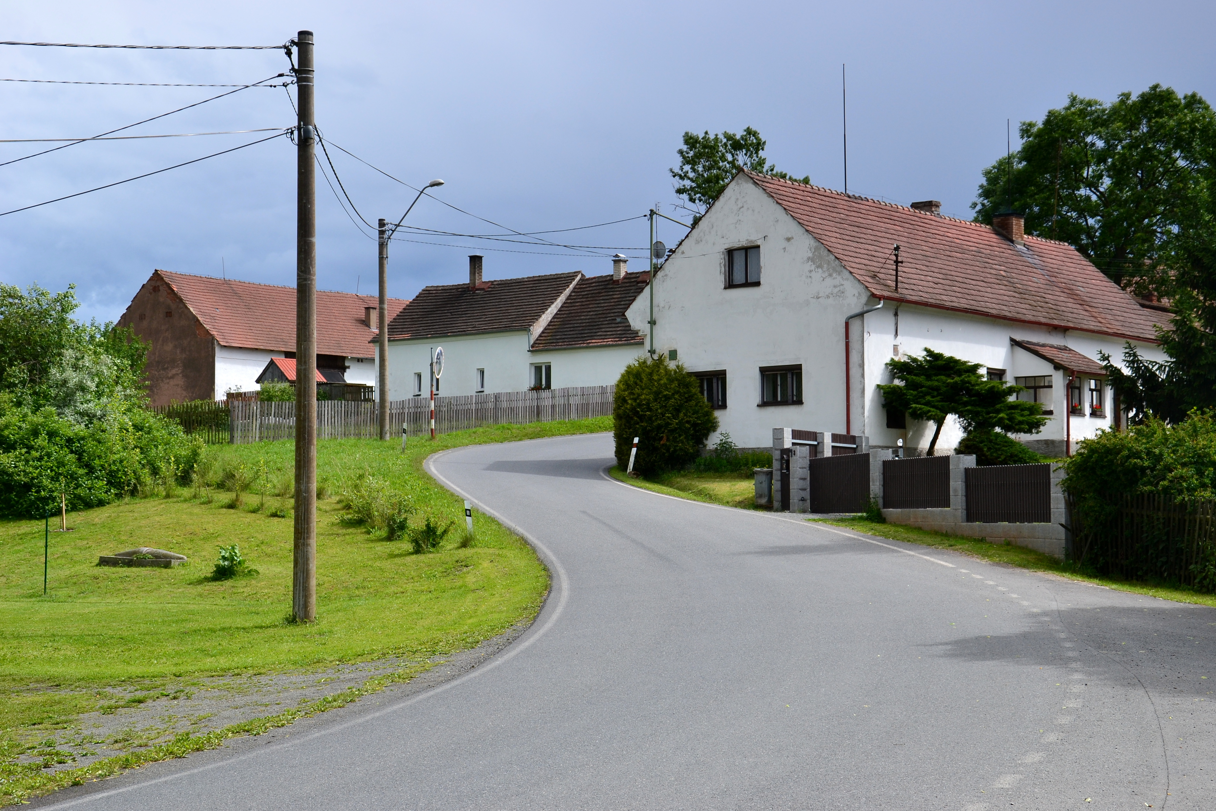 Domy na jižním okraj návsi